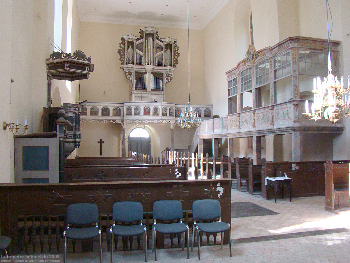 Schlosskirche Ivenack, Blick zur Orgelempore